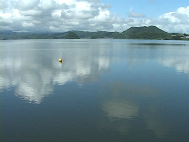 Lake Koyamaike,Tottori-city